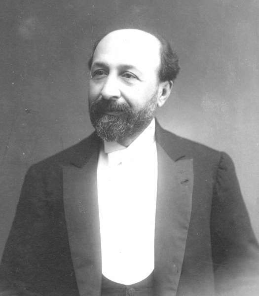 Pedro Echagüe